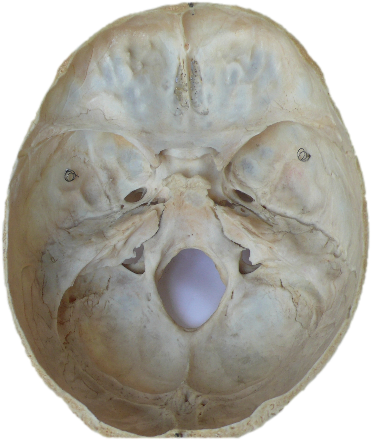 Schädelbasis Mensch von innen